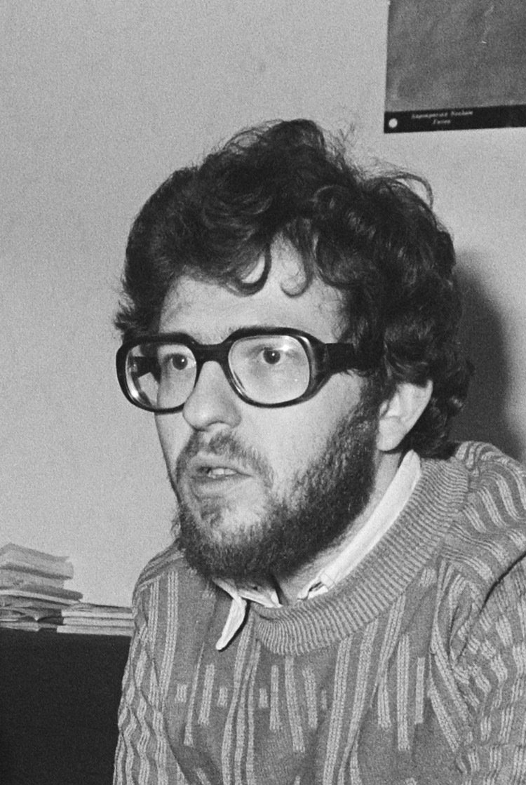 Max van Wezel, opdracht Volkskrant